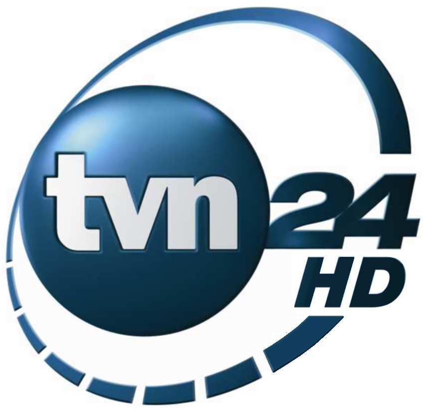 Logo stacji TVN24 w wersji HD.